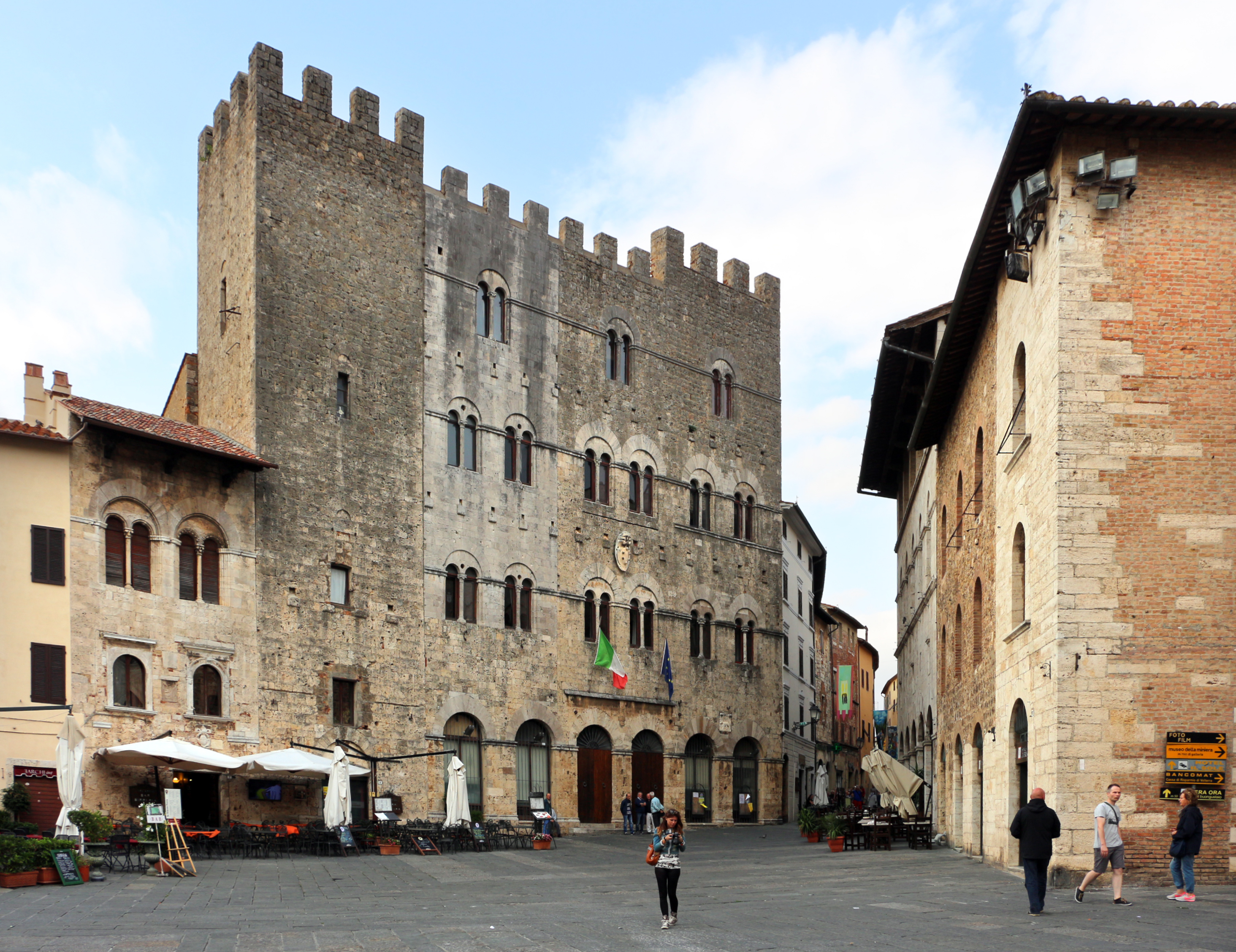 Palazzo del Comune This is a photo of a monument which is part of cultural heritage of Italy.